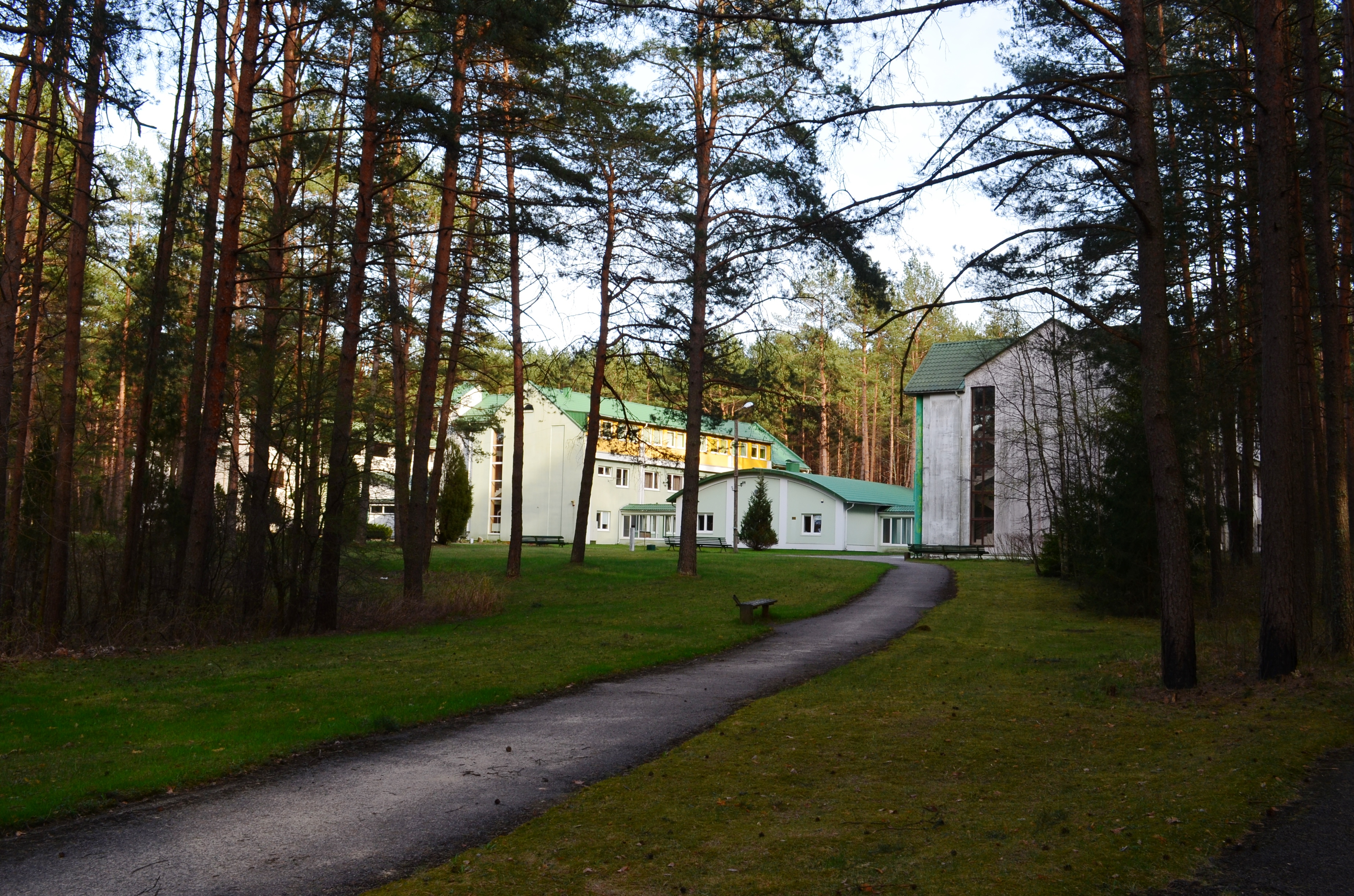 Pensionas, Balžio Šilas, Vilnius